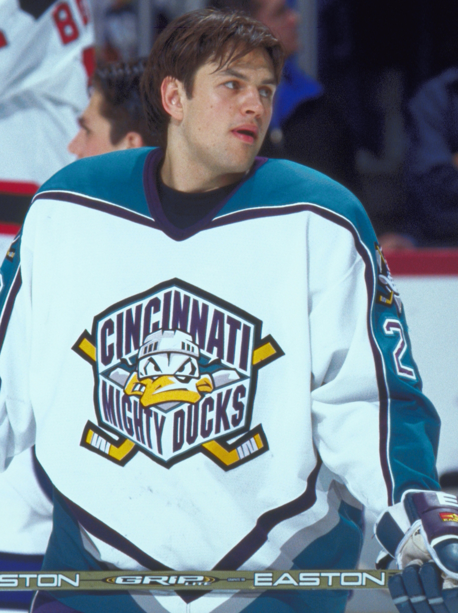 ahlstar0093